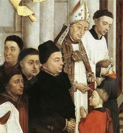 Painting, en:14th century, Flanders. Rogier van der Weyden.